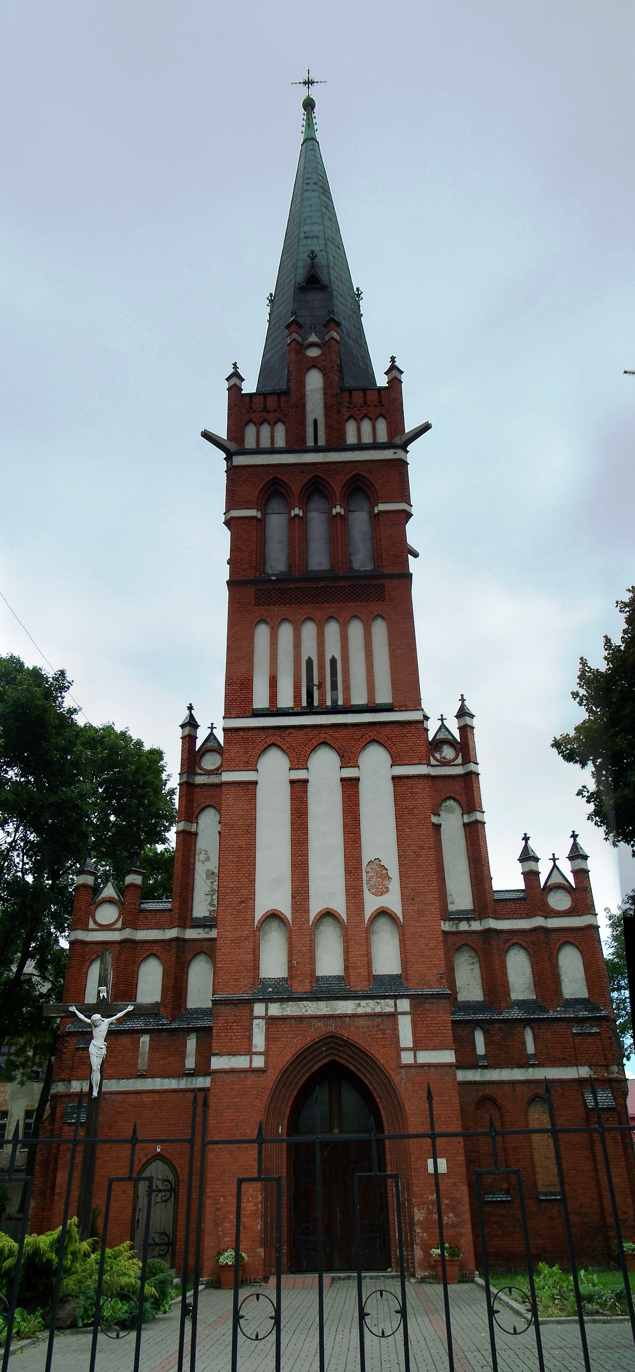 Кирха: улица Ленина, 17а, Черняховск, Черняховский район, Калининградская область